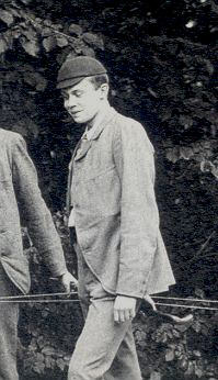 Victor av Wied